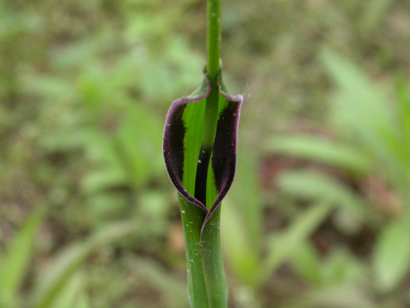 半夏花，自攝於清華園